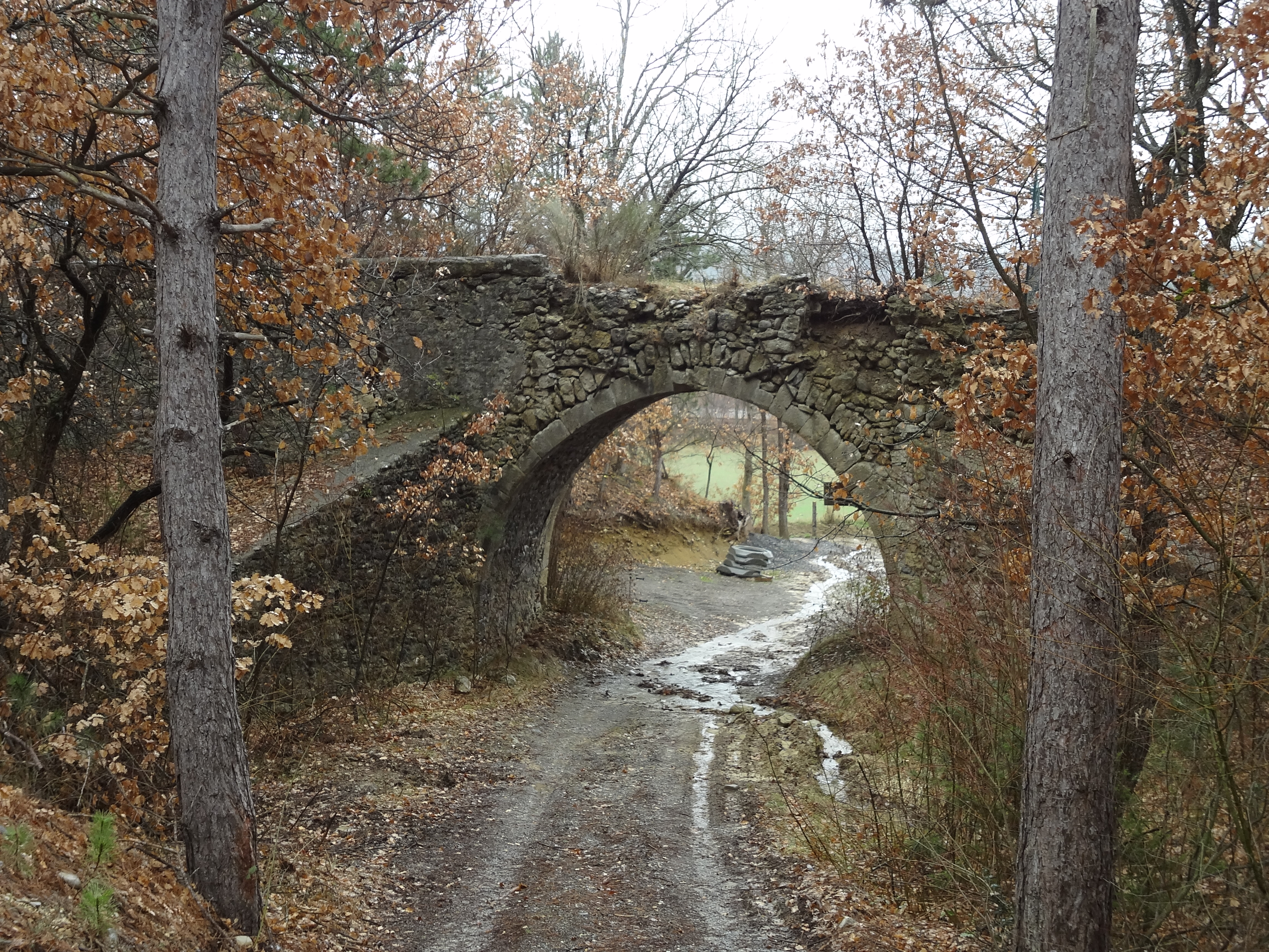 Pont d'Aiglun sur la voie dite "impériale", ancienne route nationale 85 de Grasse à Grenoble, empruntée par Napoléon Ier au début des Cent-Jours